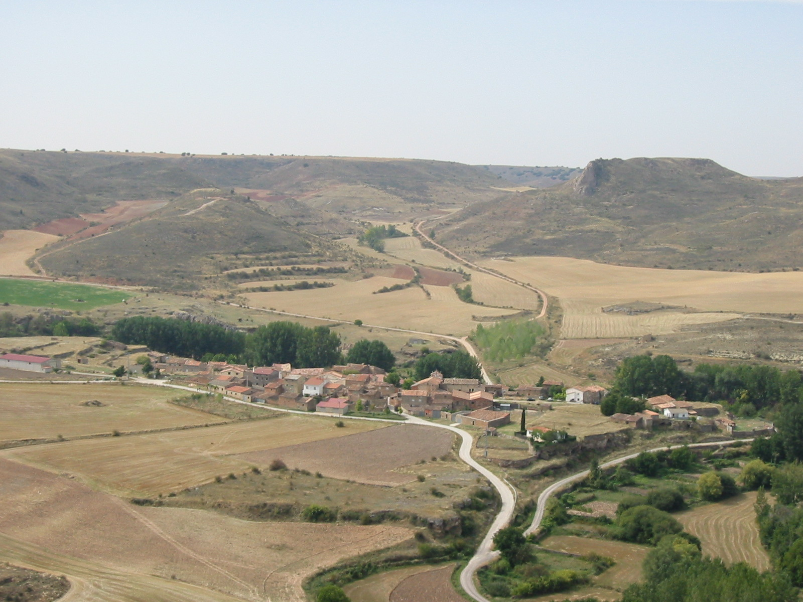 Velilla desde la Paridera de Julio Vallano